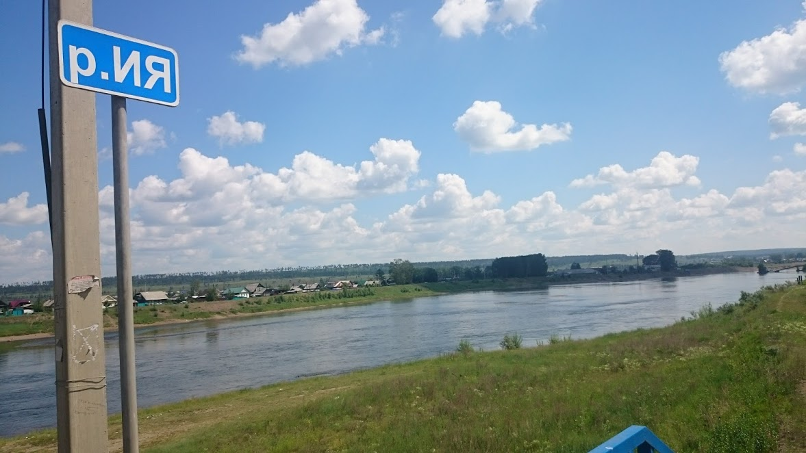 Река Ия, автомобильнй мост в п. Тулун, Иркутская область